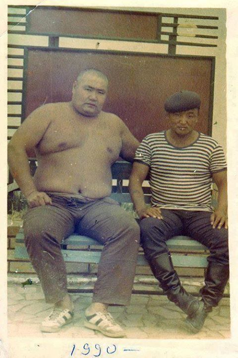 Монгол: Мундаа болон Хадбаатар